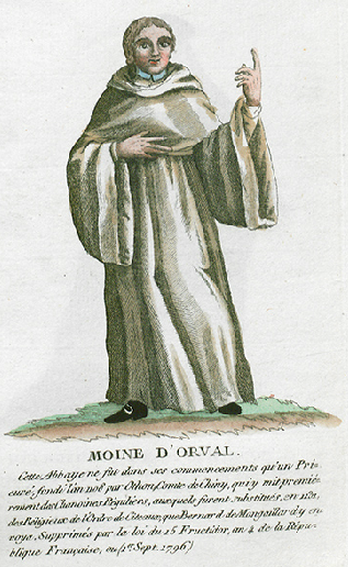 Collection de costumes de tous les ordres monastiques, supprimés à differentes époques, dans la ci-devant Belgique, Bruxelles, Philippe Joseph Maillart et sœur, 1811